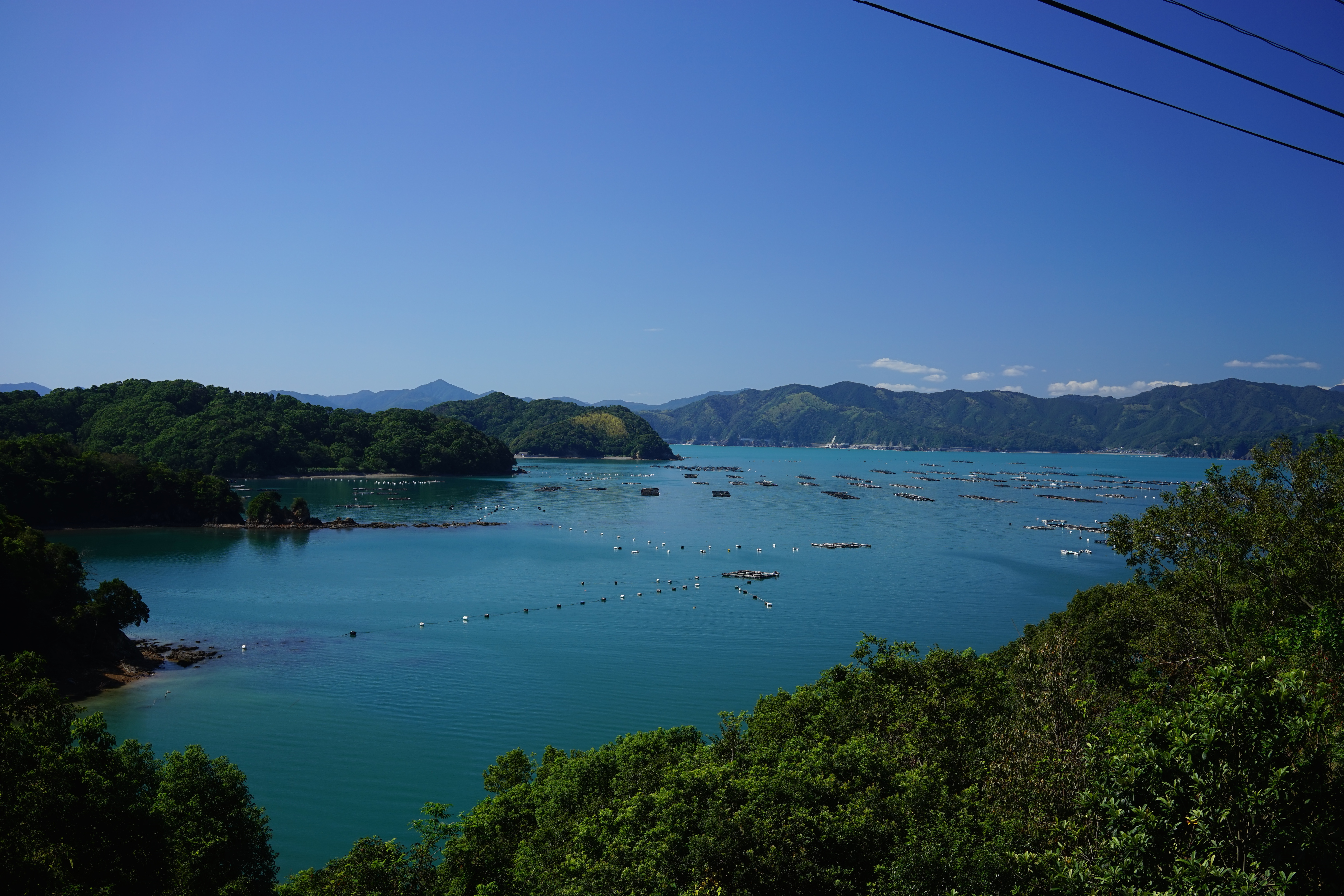 野見湾(須崎市野見）